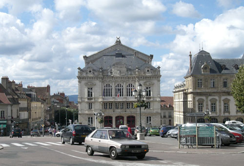 Bourgogne - Autun Champ de Mars